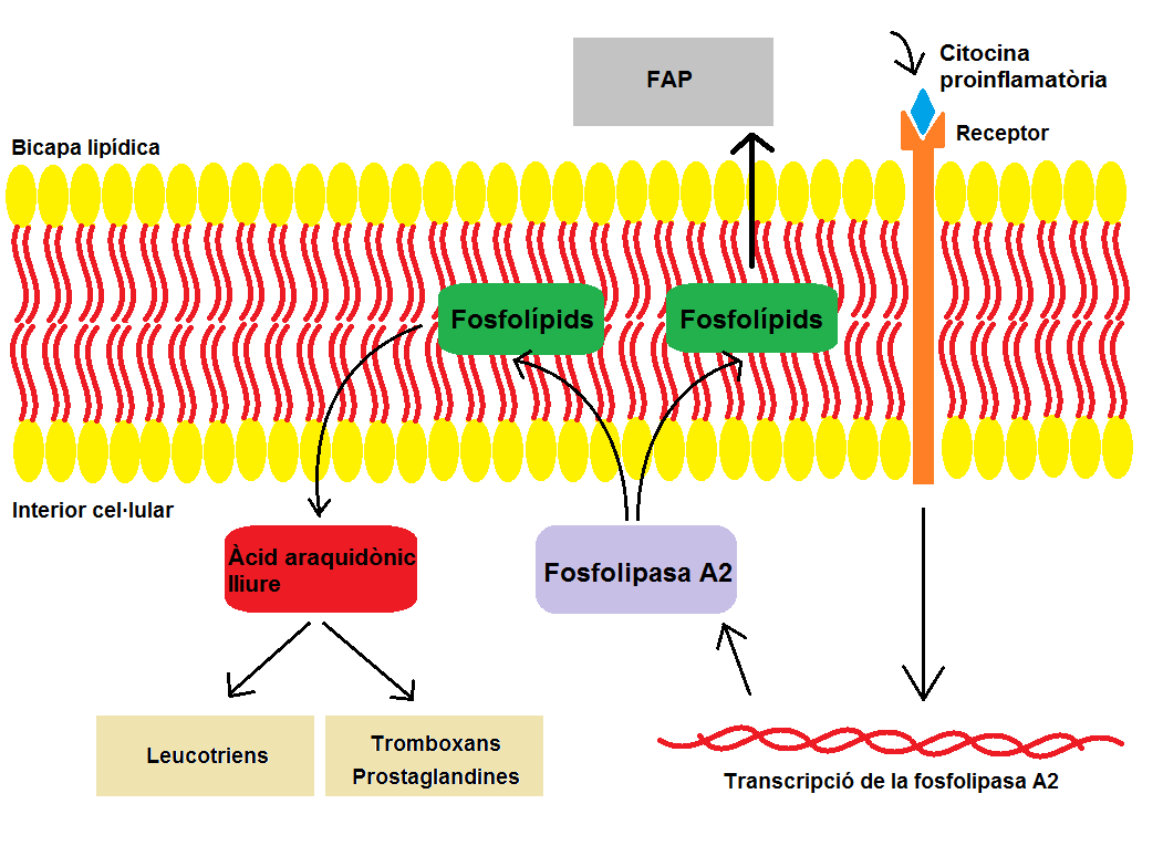 Síntesi de PAF en el procés inflamatori i de coagulació.